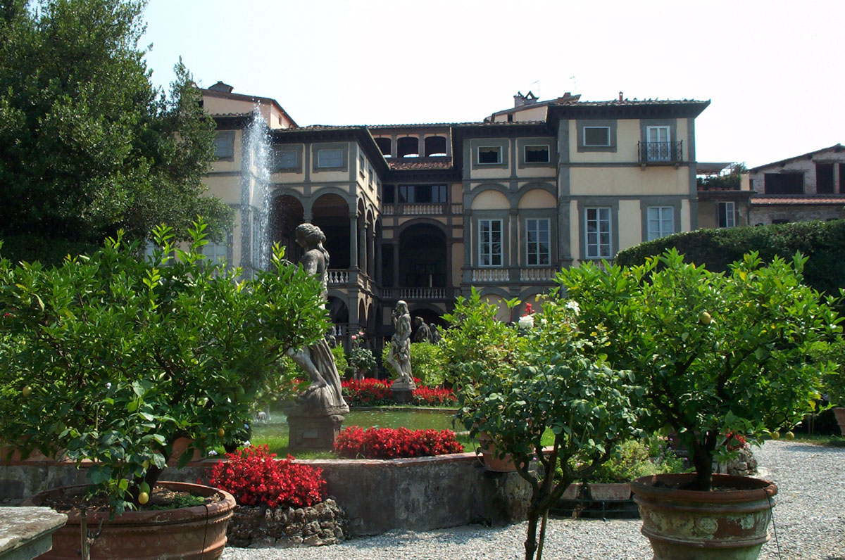 Jardin et palais Pfanner-Controni à Lucques (Italie)